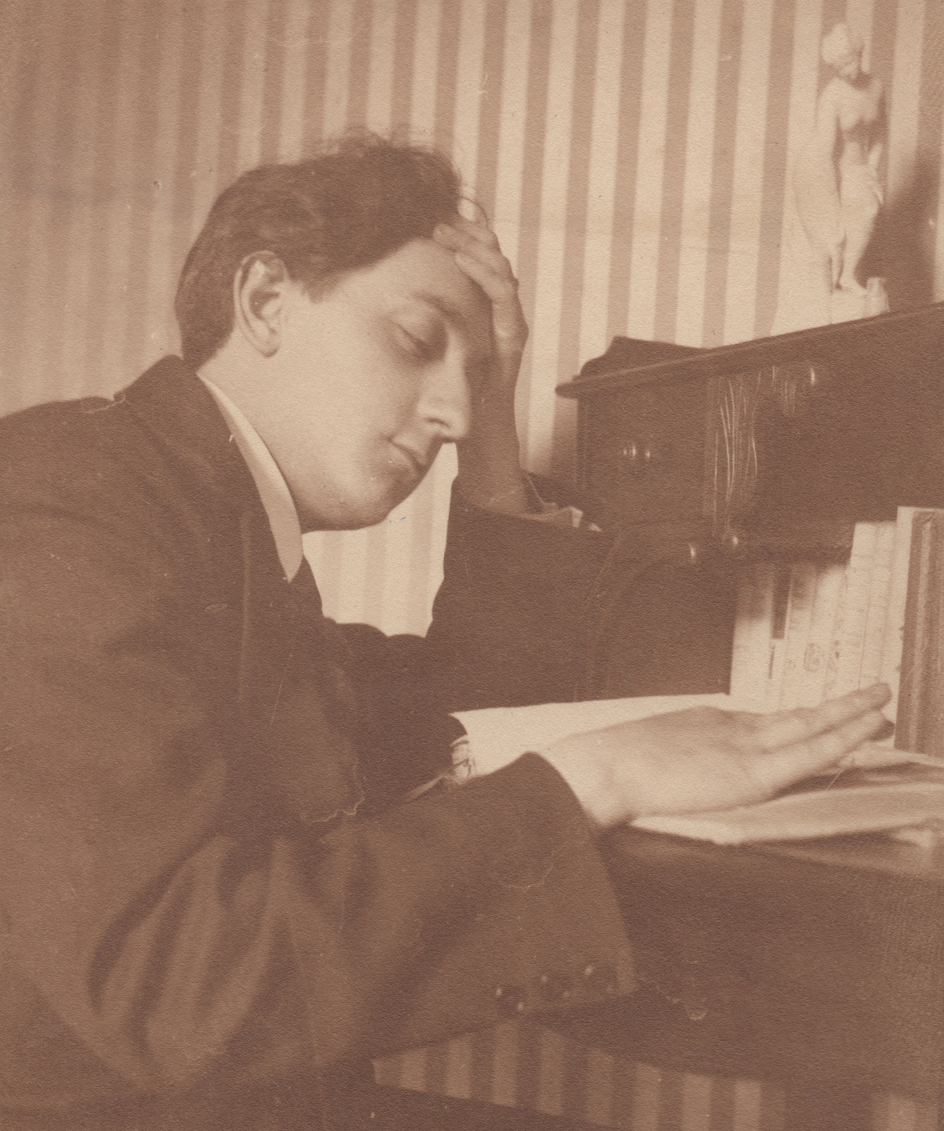 Portrait, c. 1925